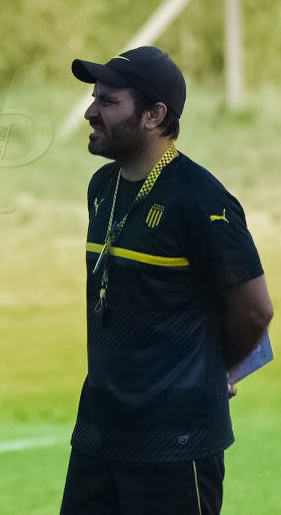 Adrian en Peñarol